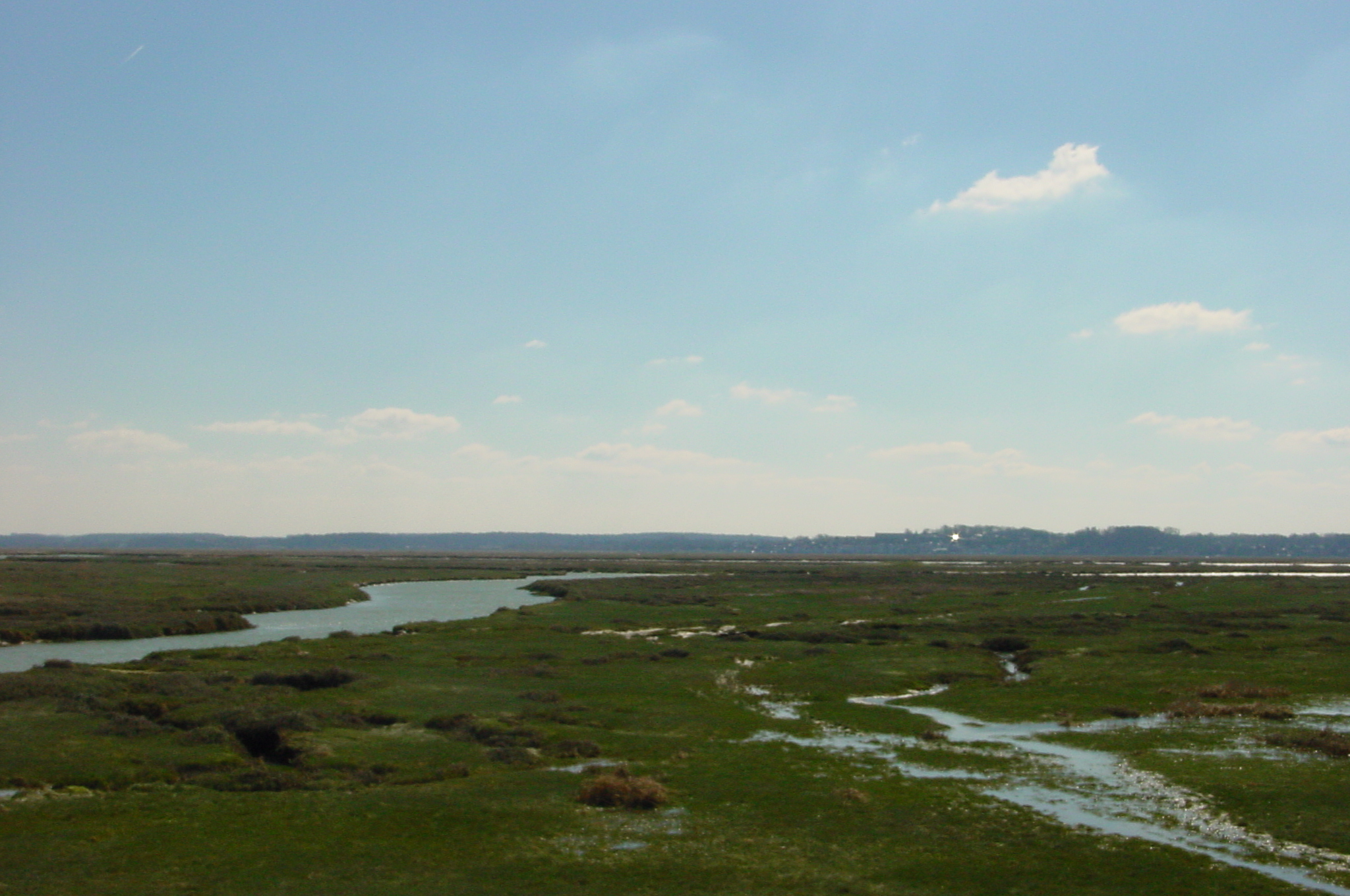 Mollières en Baie de Somme (France) - à l'arrière-plan, Saint-Valéry-sur-Somme